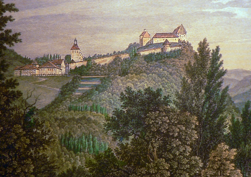 Schaumburg (Burg)